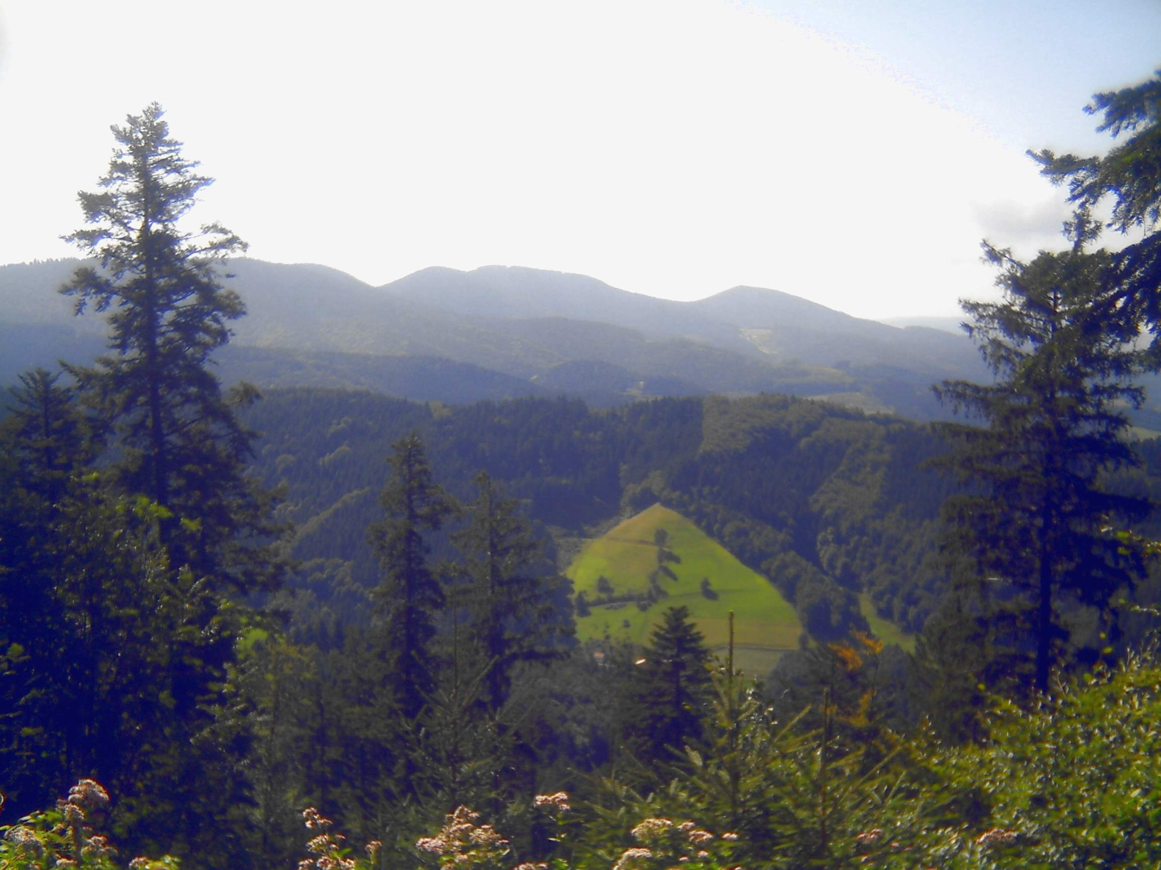 Blick vom Querweg zum Brandenkopfmassiv und in den Harmersbach